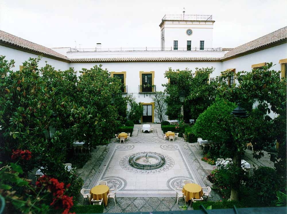 Real Círculo de la Amistad, Córdoba (España).